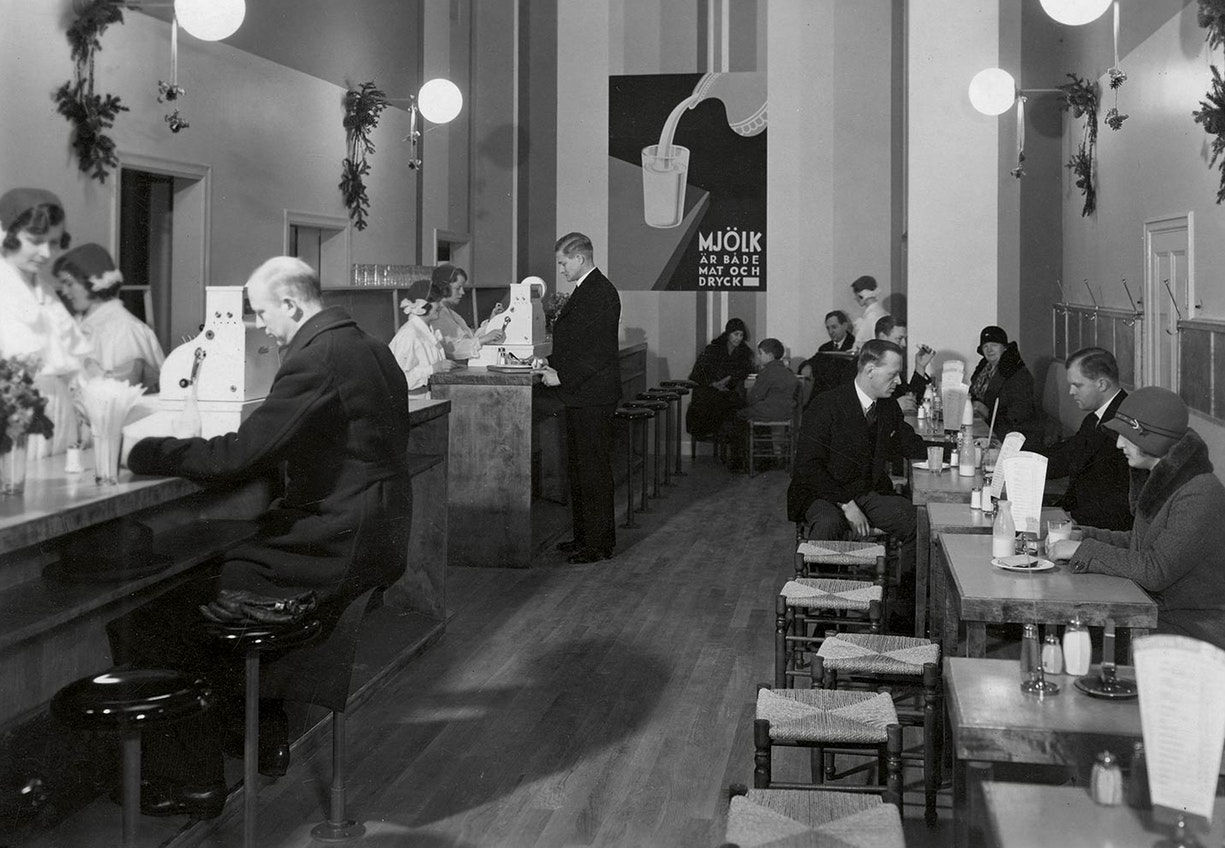 Mjöklbar vid Hamngatan i Stockholm 1930